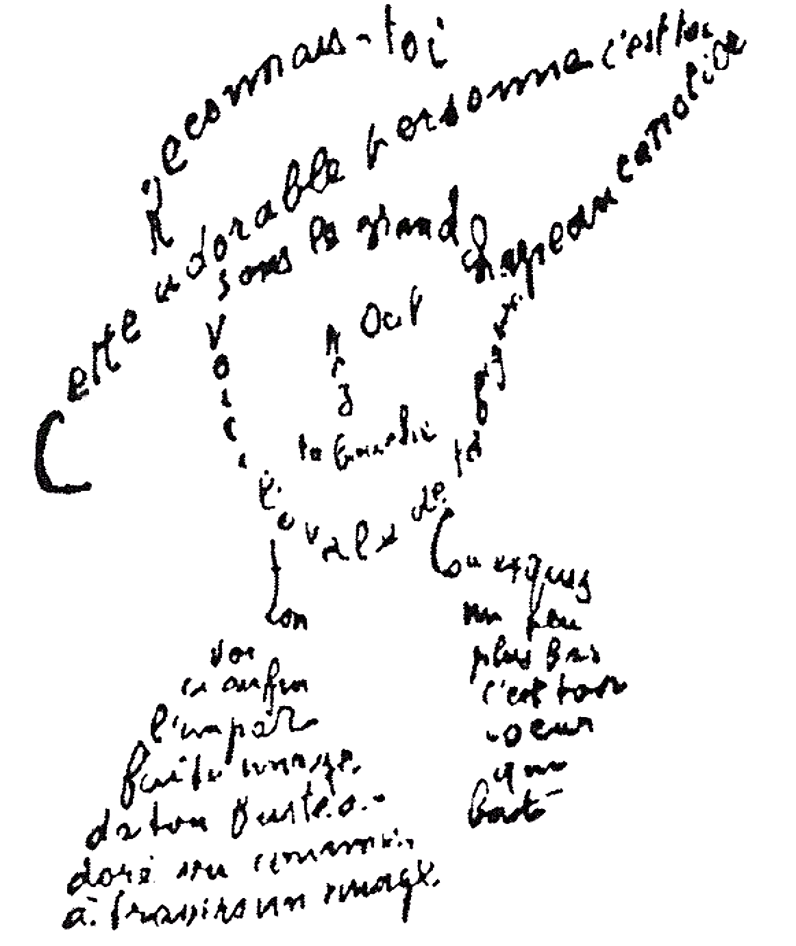 Extrait du Calligramme de Guillaume Apollinaire intitulé poème du 9 février 1915.